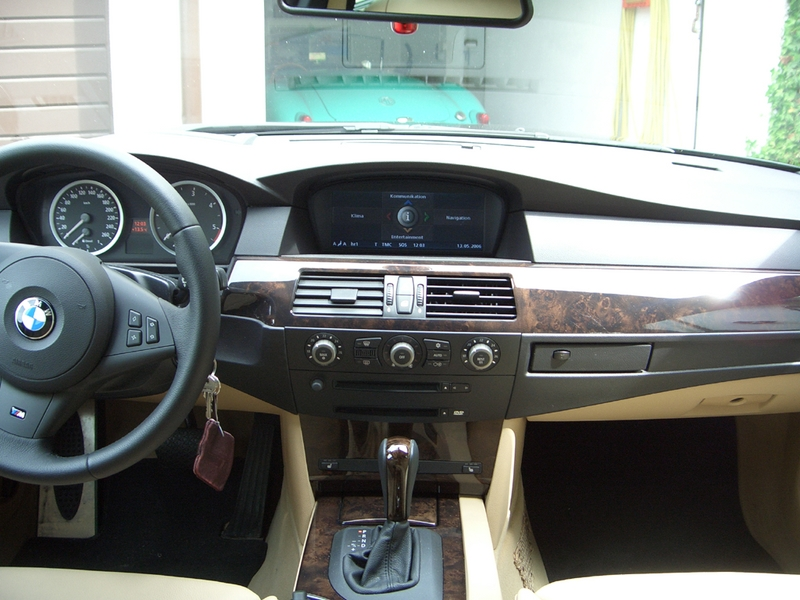 Interieur eines E60 525d